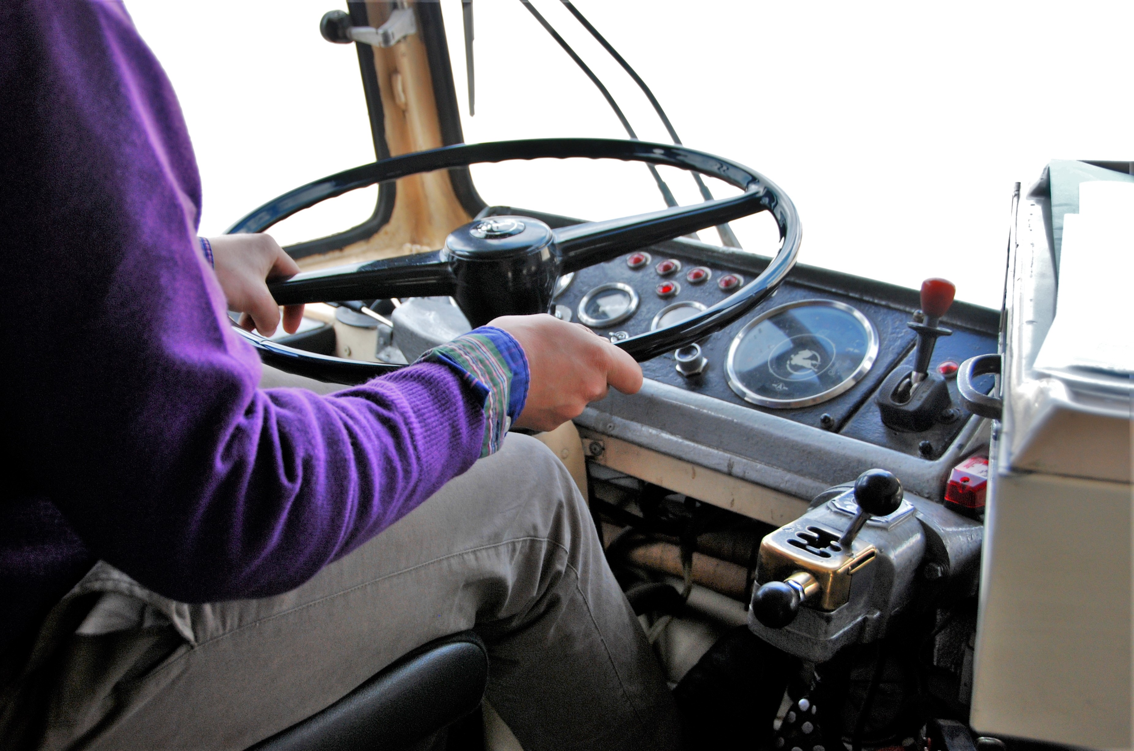 Puesto de conducción del autobús articulado Pegaso 6035-A, que en ese momento era propiedad de la AAFCB. Fue el antiguo 3031 de TB, y luego el 16 de la UAB. A la derecha puede verse la palanca del cambio de marchas semi-automático Wilson ISA.